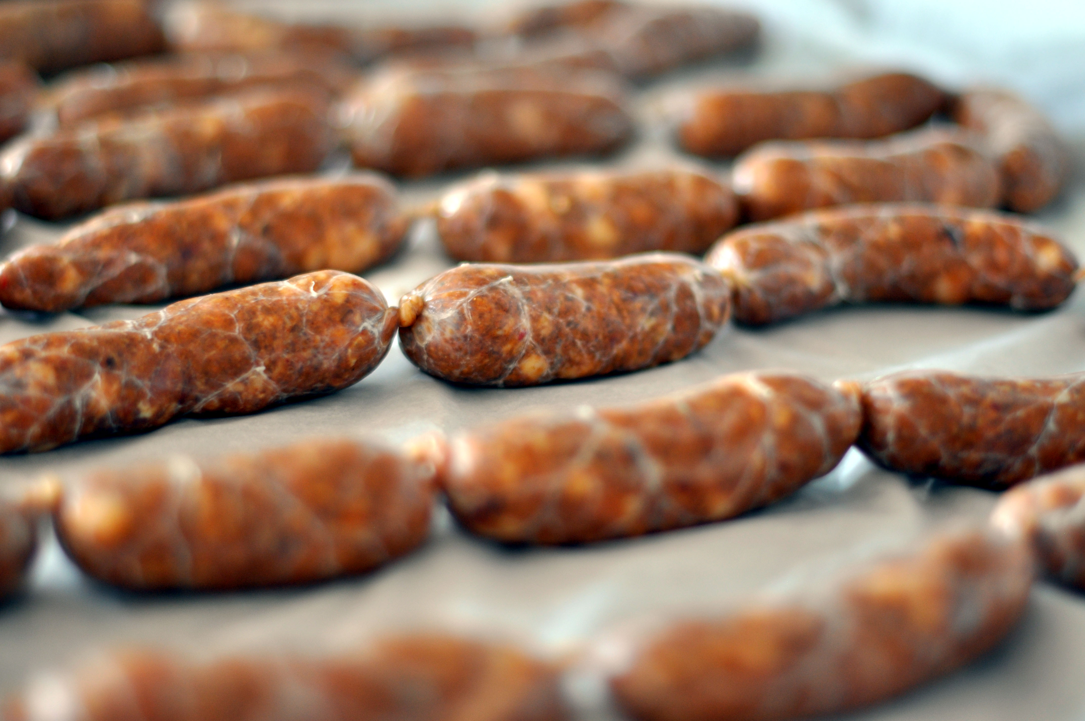 Chorizo